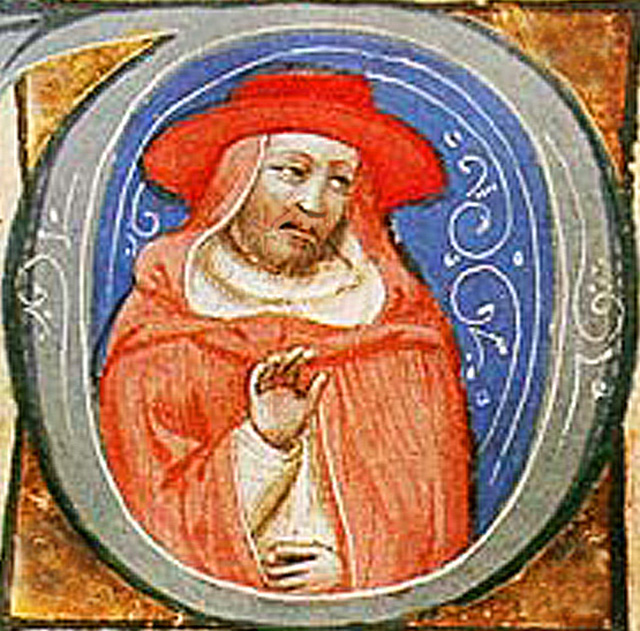 Cardinal Anglic de Grimoard